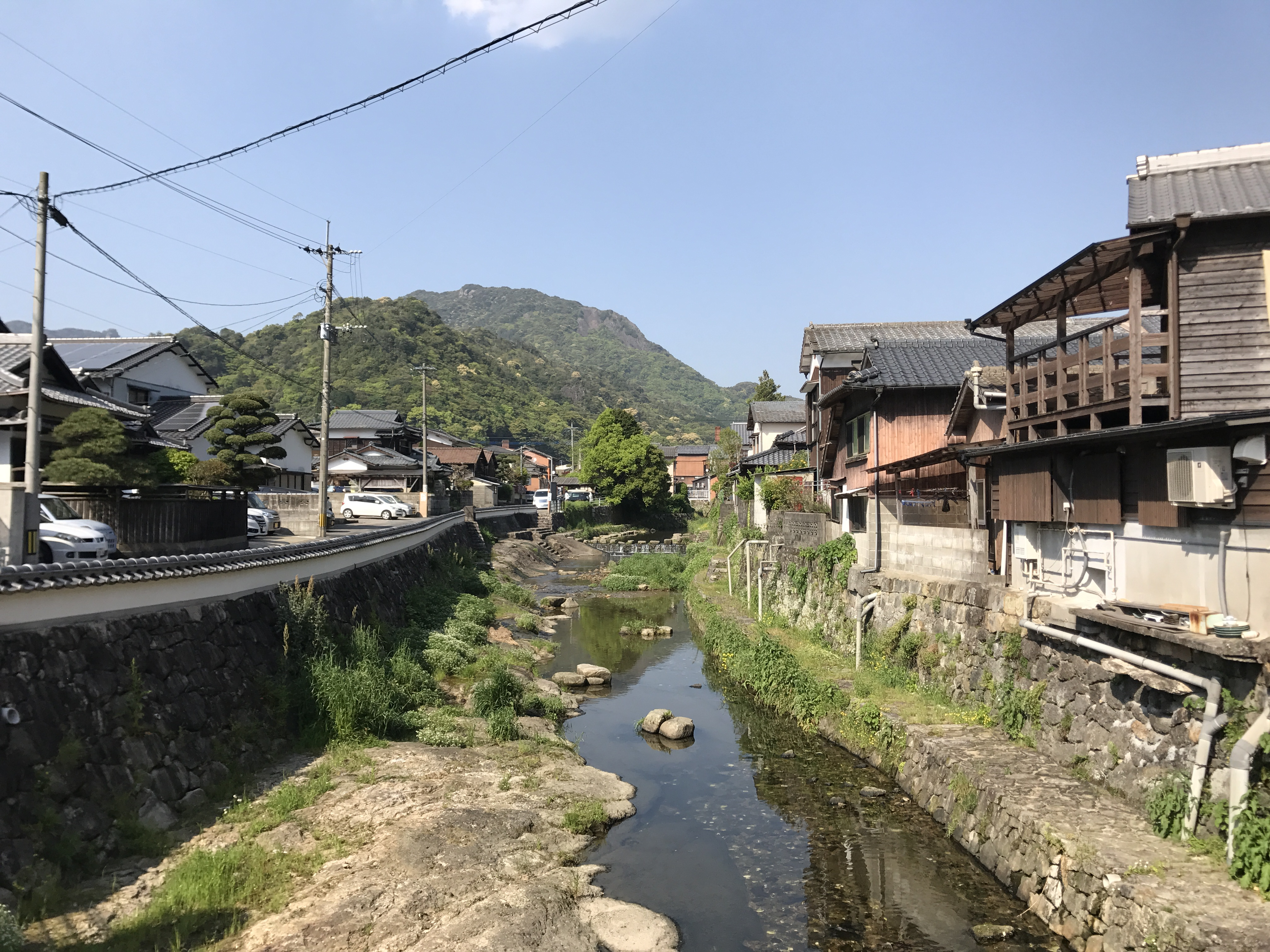 稗古場橋より望む白川川(上流側)